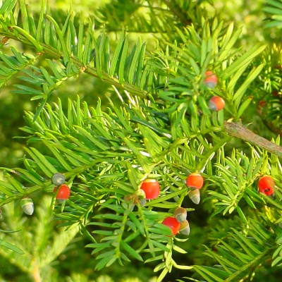 Gold-Eibe Taxus baccata 'Aurea' - Blätter mit Früchten Quelle: Fotografiert September 2003 Fotograf: Reinhard Kraasch Copyright Status: GNU Freie Dokumentationslizenz 19:12, 14. Sep 2003 RKraasch 400 x 400 (70510 Byte) (Eibe)